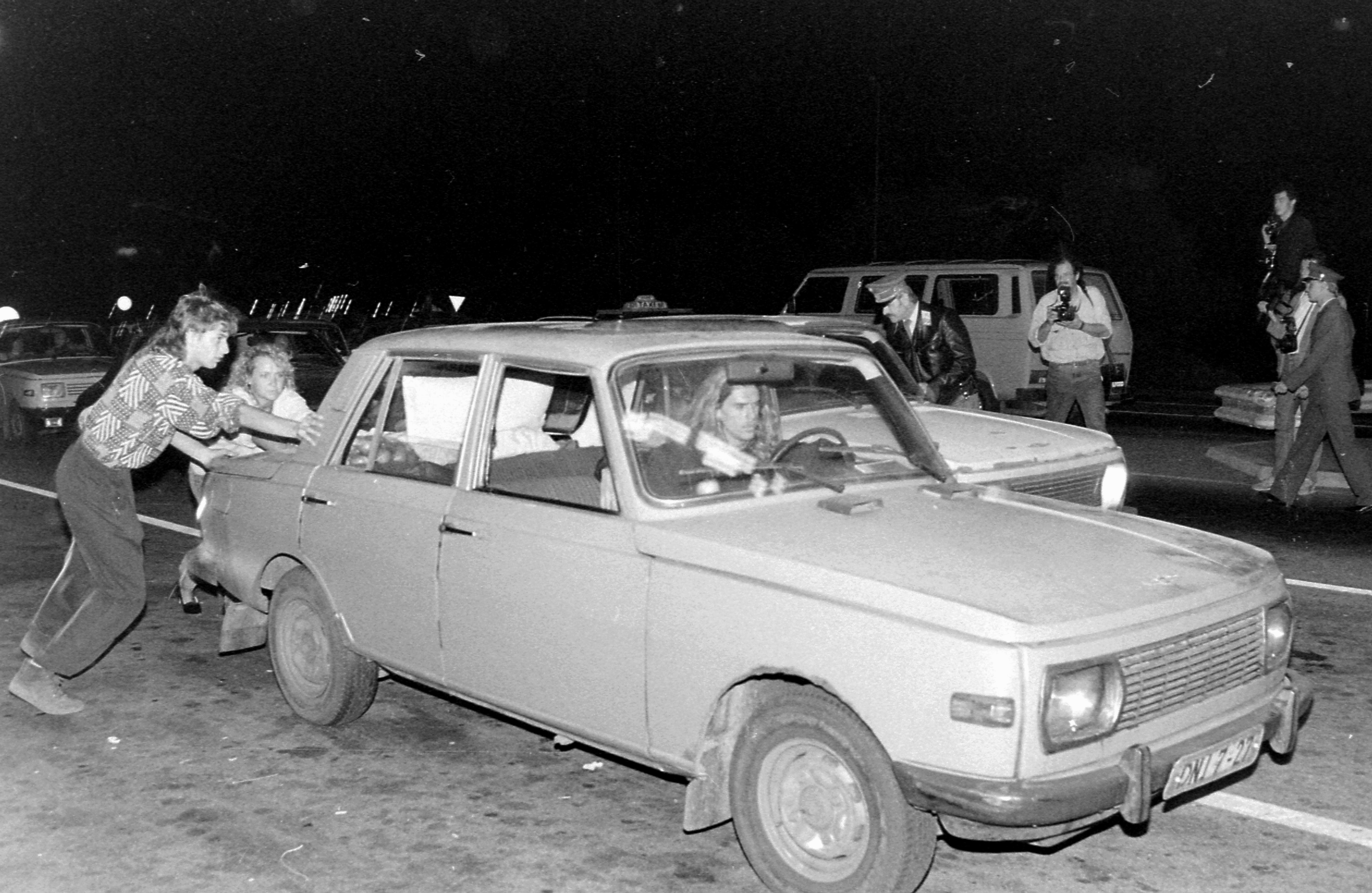 MAGYARORSZÁG, HEGYESHALOM, a megnyitott határátkelő, NDK-s Wartburg 353W. 1989. szeptember 10-én a magyar kormány megnyitotta az ország nyugati határát az NDK-menekültek előtt.